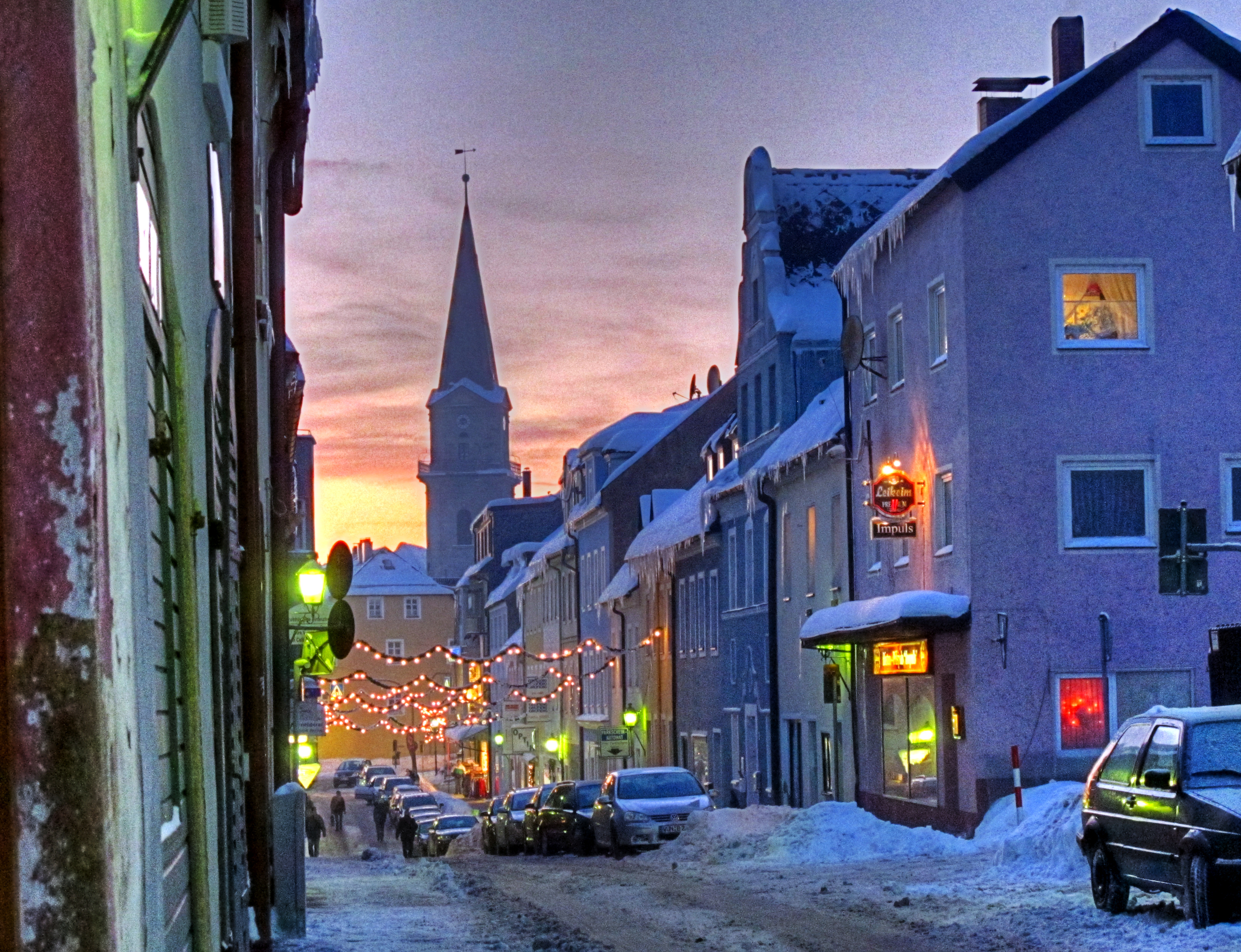 Marktredwitz, weihnachtliche Abendstimmung, Egerstraße, Blick auf die Bartholomäuskirche, Dezembert 2010, Tonmapped HDR Aufnahme